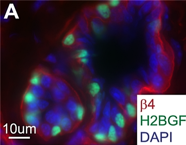 Figura 2. Las LRC de las glándulas sudoríparas están unidas a la membrana basal y poseen características mioepiteliales. (A) Las LRC de las glándulas sudoríparas están unidas a la membrana basal y son positivas para la integrina β4 (rojo).